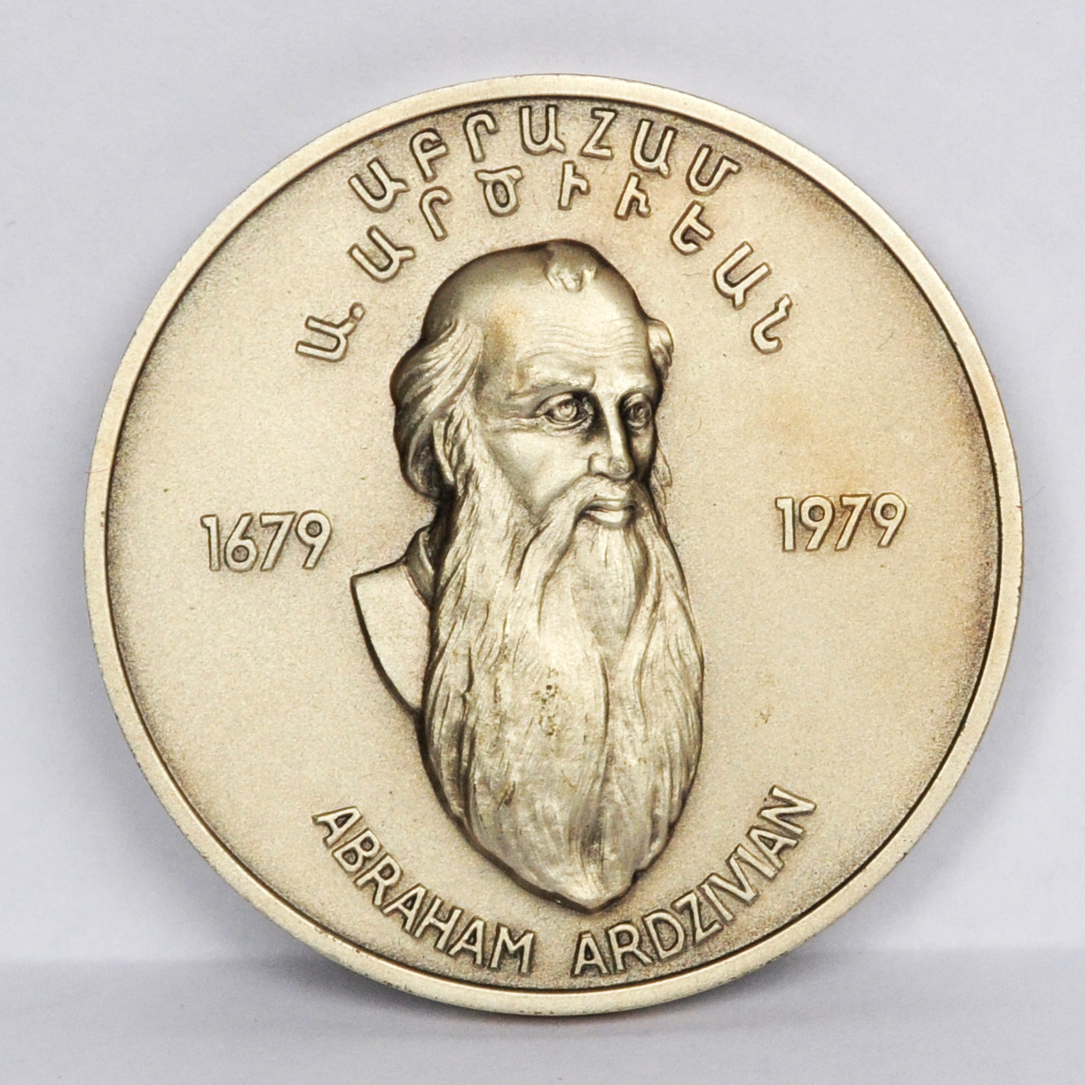 Նվիրված Կաթողիկե հայերի կաթողիկոս-պատրիարք Աբրահամ Արք. Արծիվյանի ծննդյան 300 ամյակին